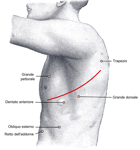 Incisione chirurgica per il trattamento del tumore del polmone